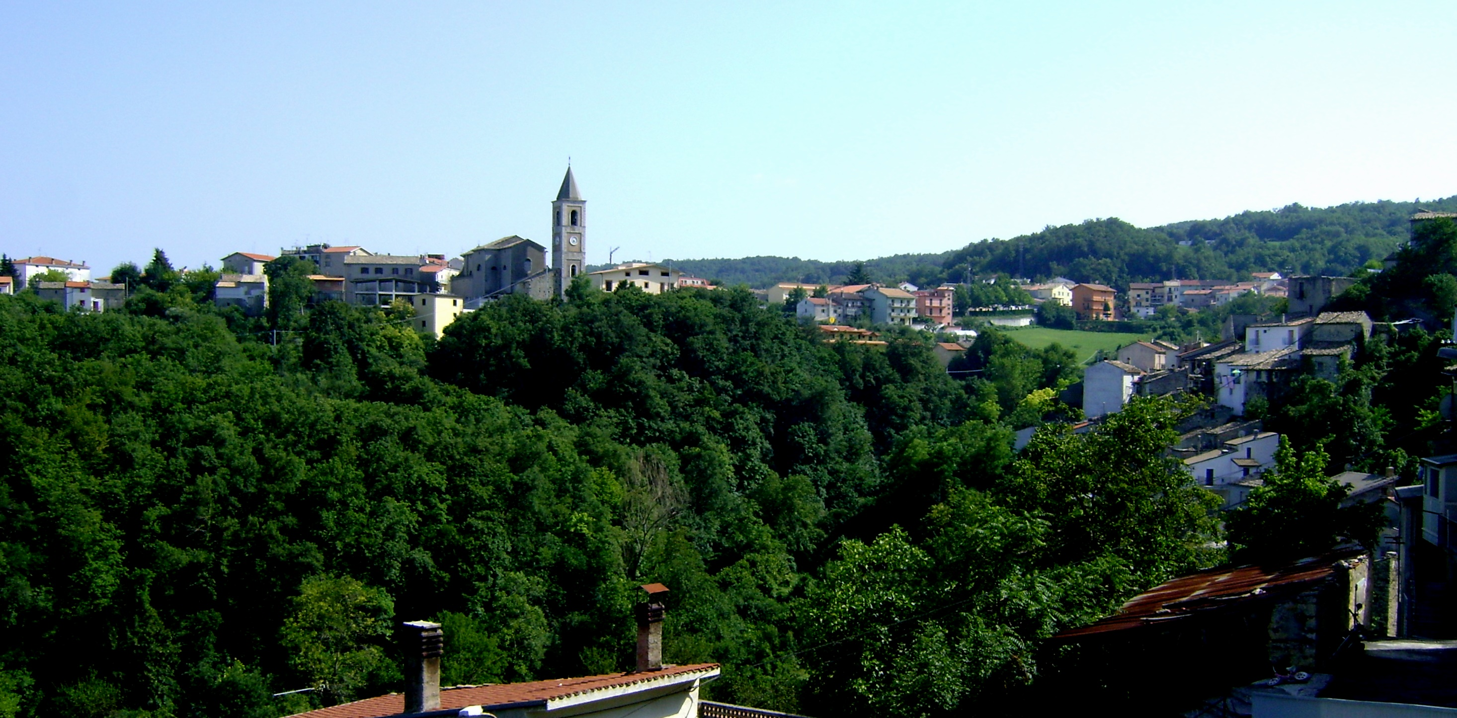 Veduta di Tornareccio, Chieti.